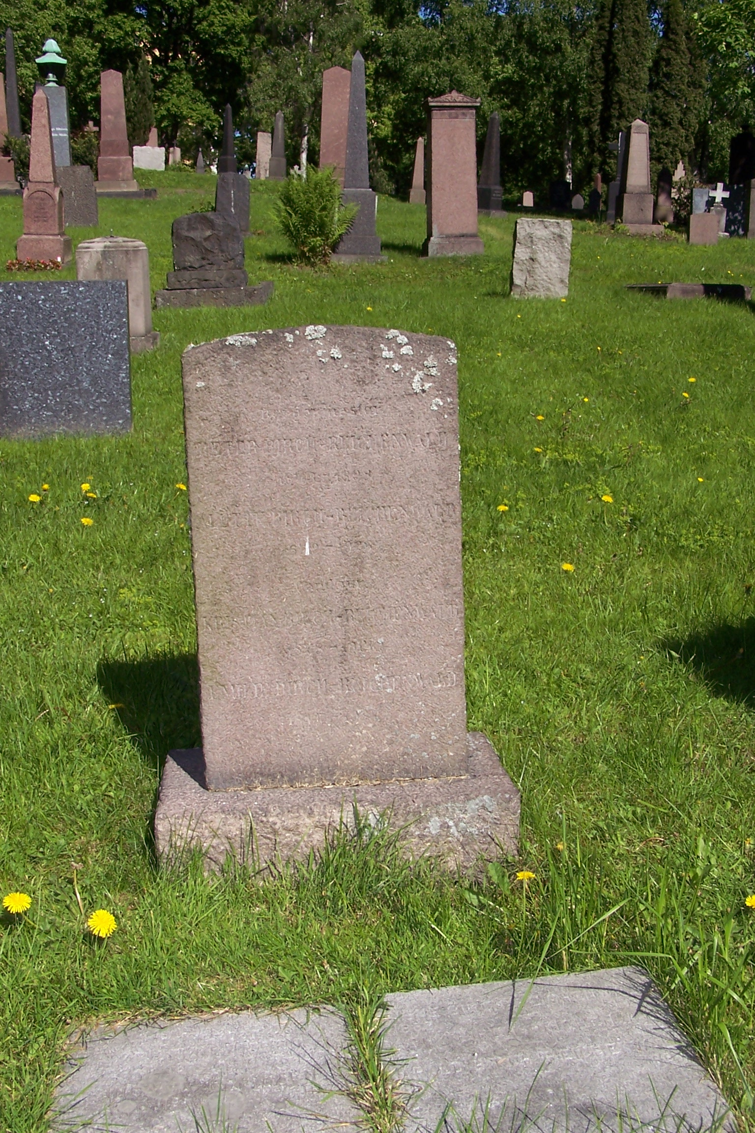 Tomb of Christian Birch-Reichenwald at Vår Frelsers gravlund, Oslo